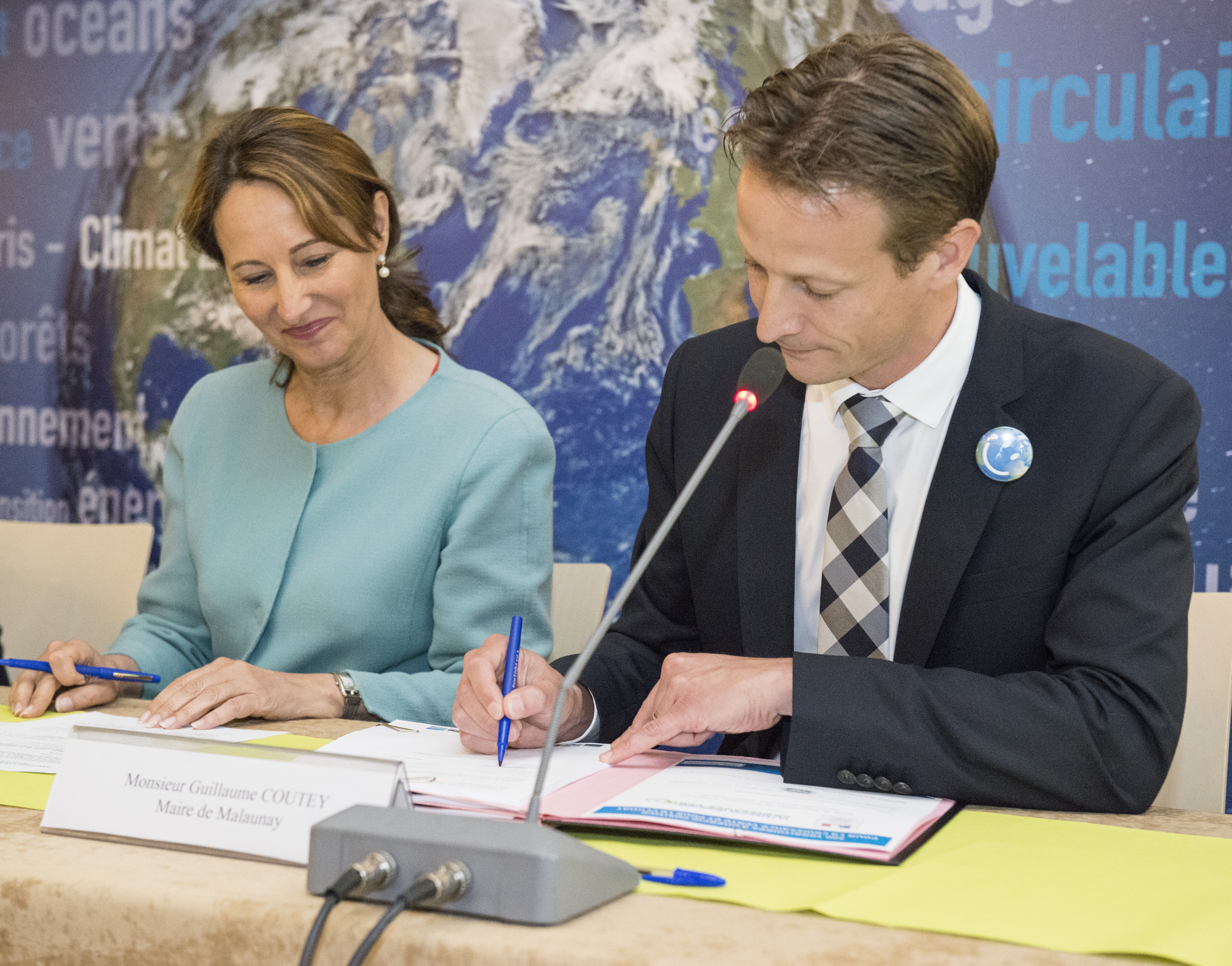 Signature de la convention TEPCV de la commune de Malaunay le 16 juin 2015 en présence de la ministre Ségolène Royal